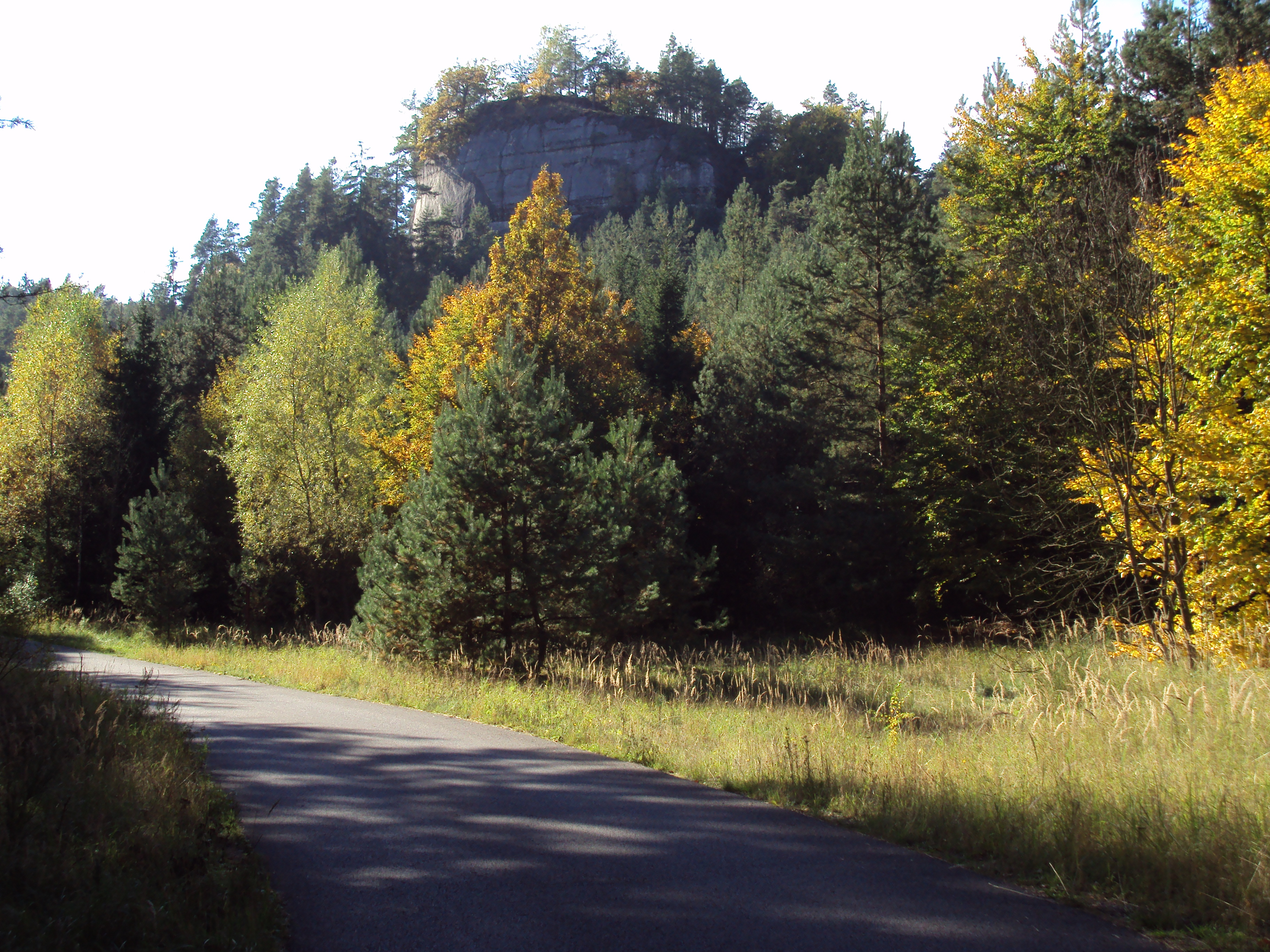 Přírodní památka Stohánek 4km jižně od Hamru na Jezeře